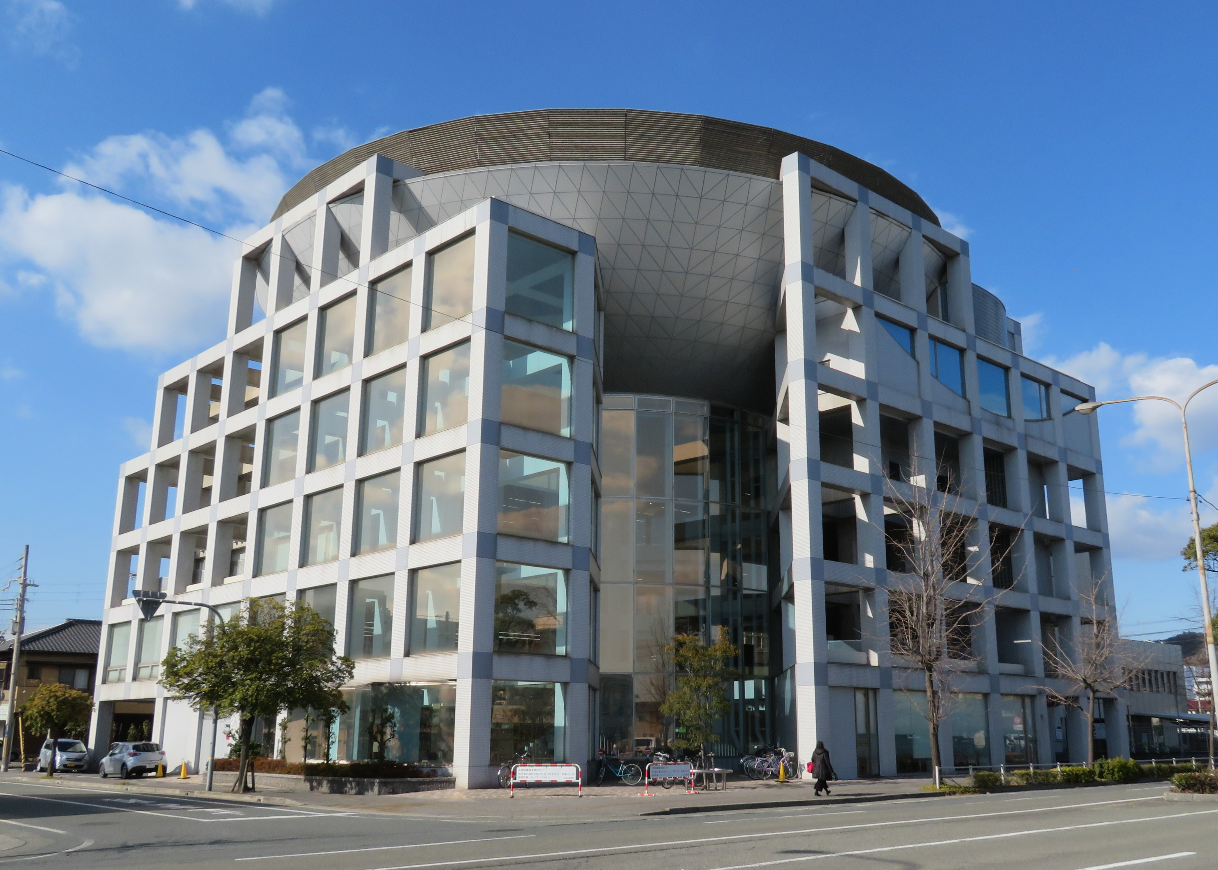 姫路市立図書館広畑分館